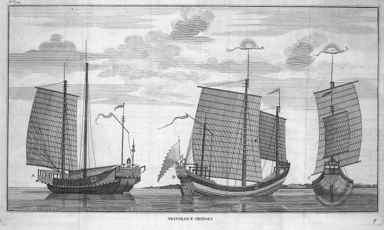 [Illustrations de Voyage autour du monde] Auteur : George Anson Éditeur : Henri-Albert Gosse et Compagnie (Genève) 1750